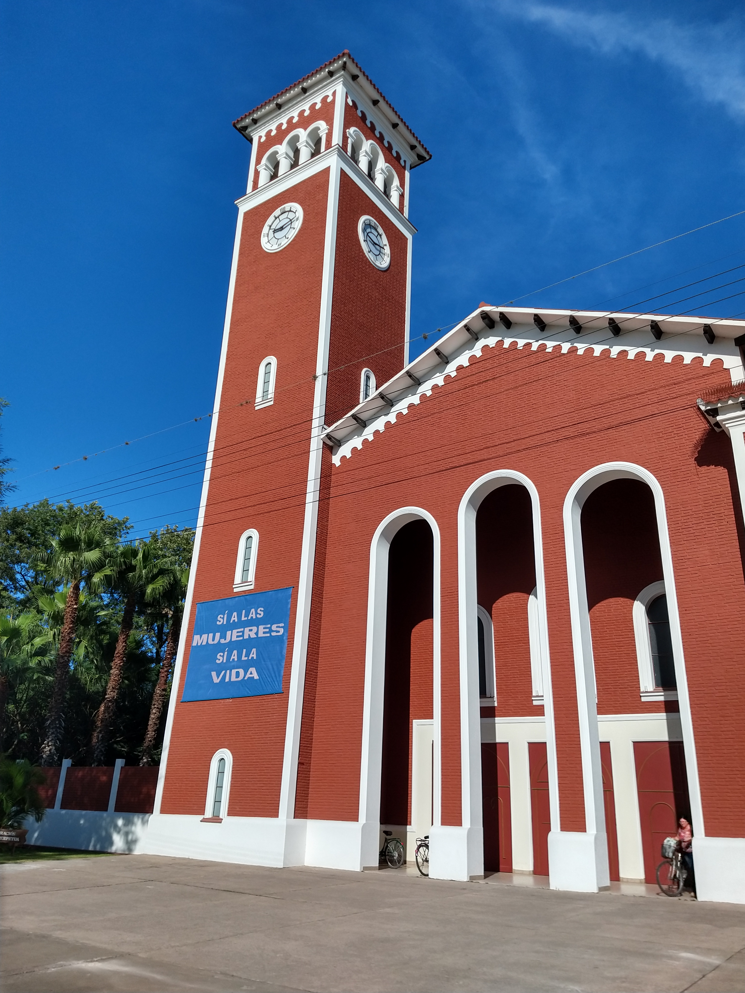 Foto del Templo de la Parroquia Nuestra Señora del Huerto de Malabrigo. Restaurada: Campanario y Reloj automotizado